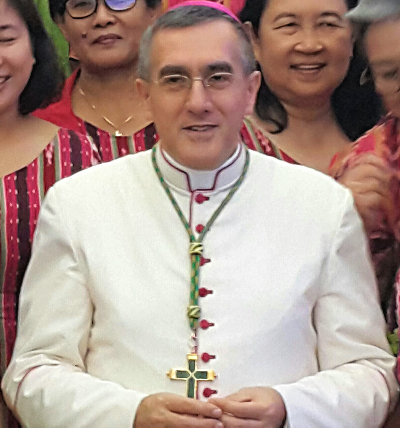 Nuncio Apostolik, Piero Pioppo